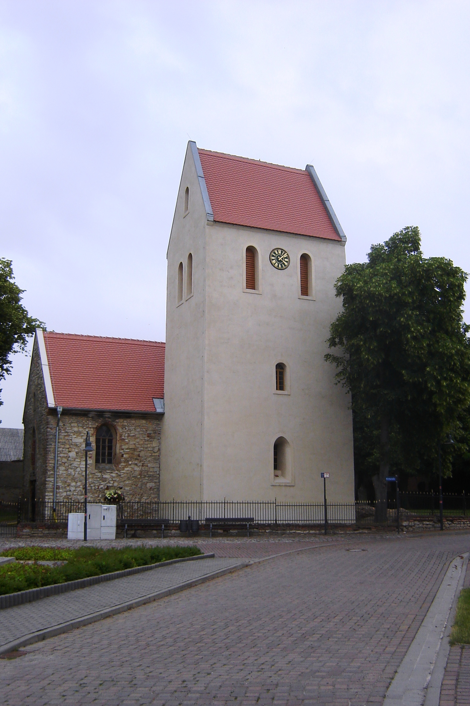 St.-Salvator-Kirche (Kleinmühlingen)